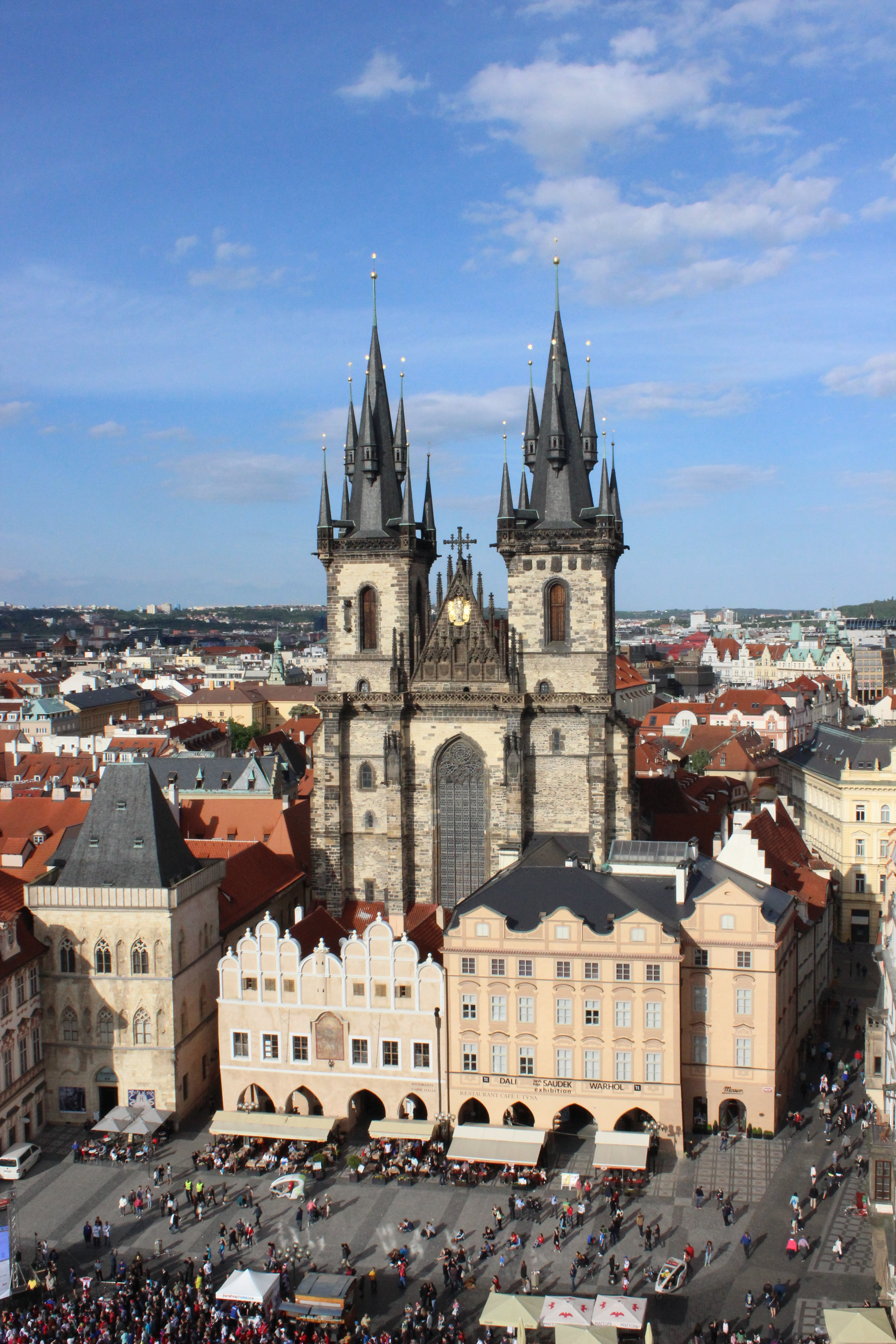 Pohled na Týnský kostel z věže Staroměstské radnice v Praze.